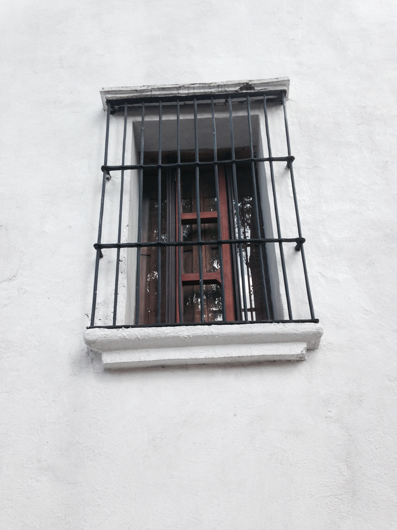 Una de las ventanas de la Casa Blanca, se encuentra de lado izquierdo de la entrada principal de la casa, en esta ventana es en donde se supone que Doña Guiomar murió esperando a su amado. Delegación Álvaro Obregón. Distrito Federal México.